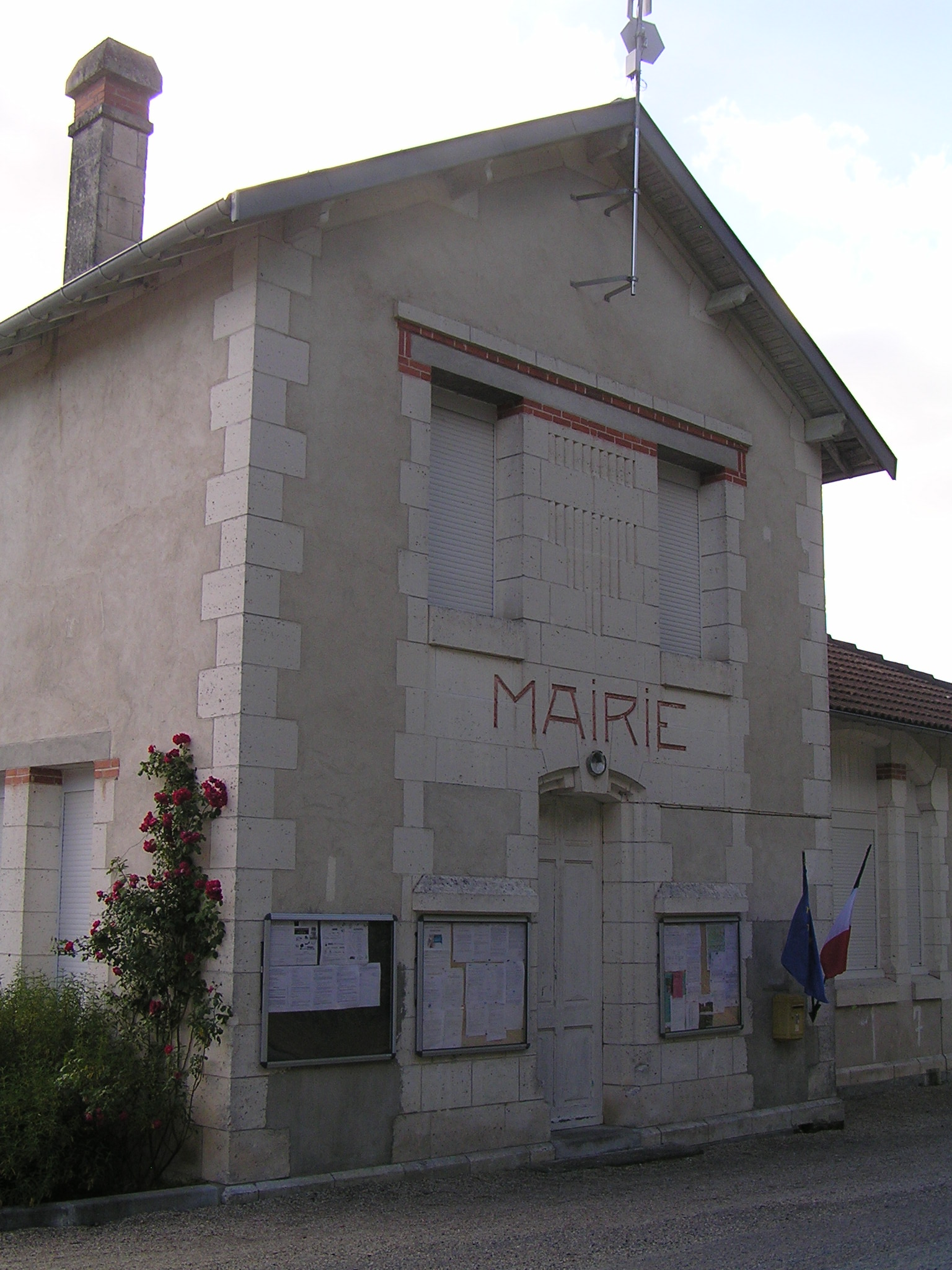 mairie de Bors-de-Baignes